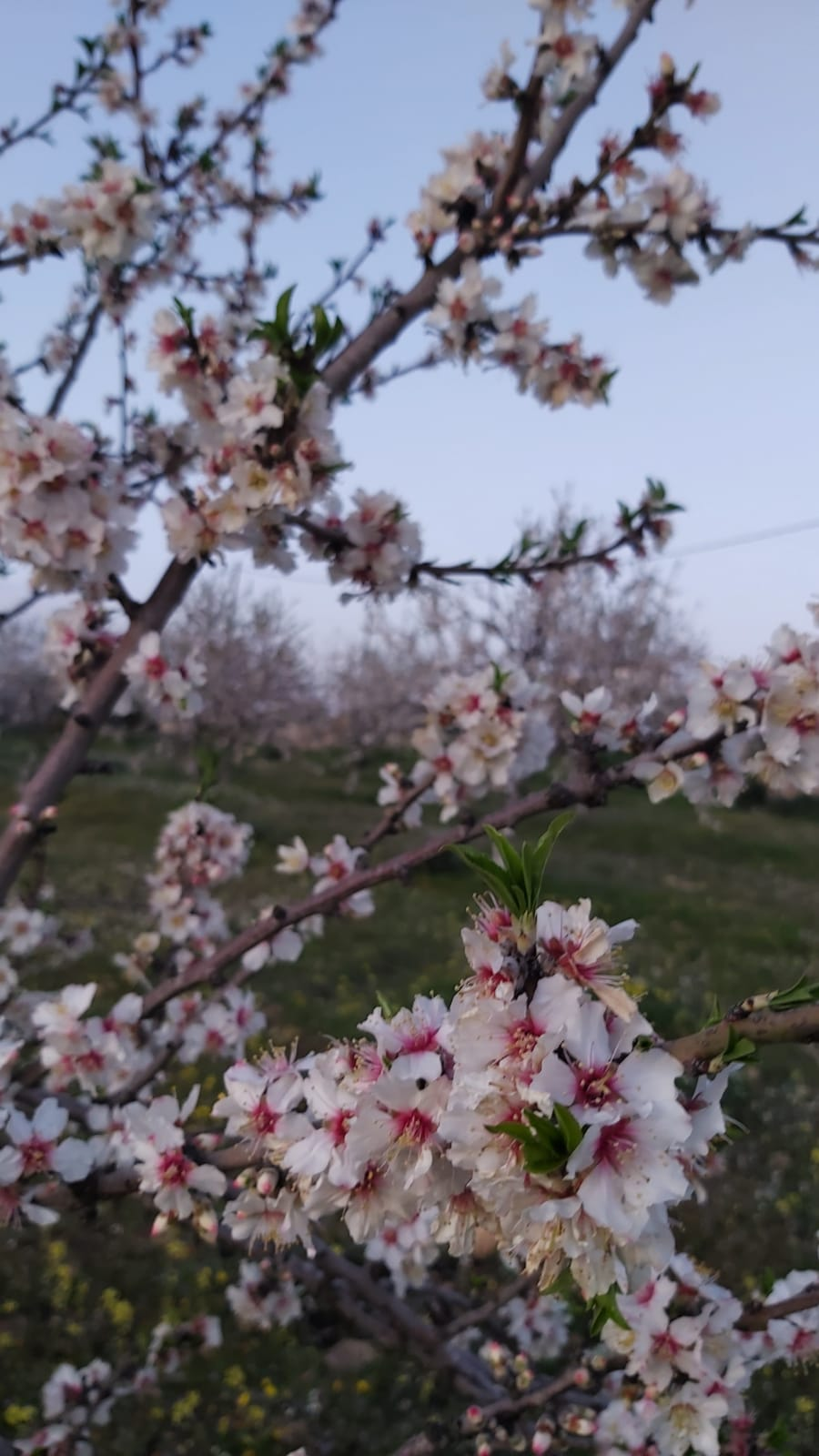 أزهار اللور فترة النوار